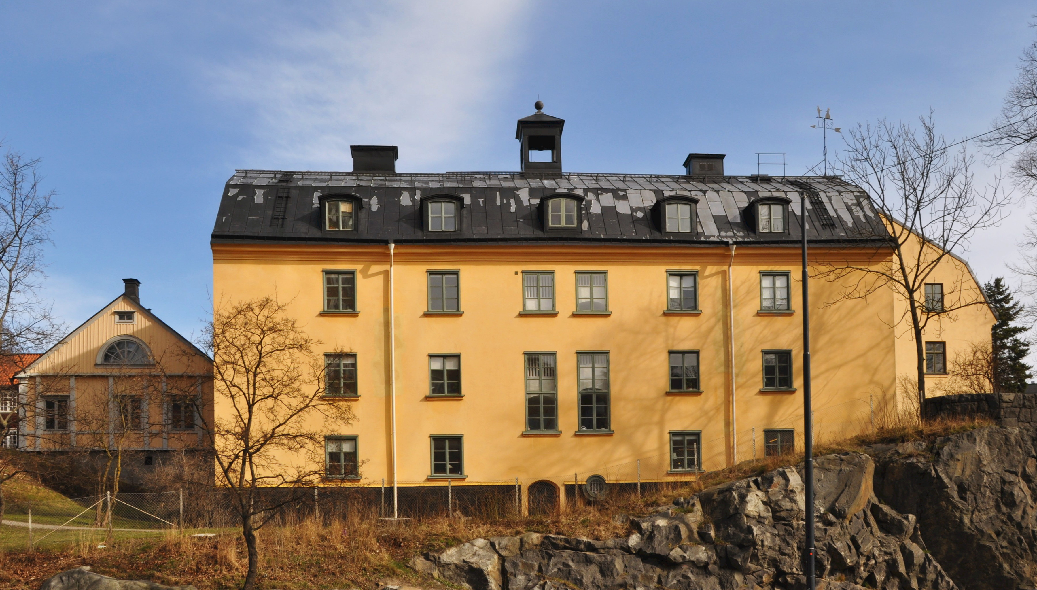 Grötlunken 5, Sabbatsbergsvägen 1, Nybyggnadsår 1754 - 1756, Fattighusdirektionen (Byggherre), Peter Westrell (Byggmästare), Peter Westrell (Arkitekt) Nicolaihuset uppfördes ursprungligen som fattighus för fattighjonen i Nicolai församling